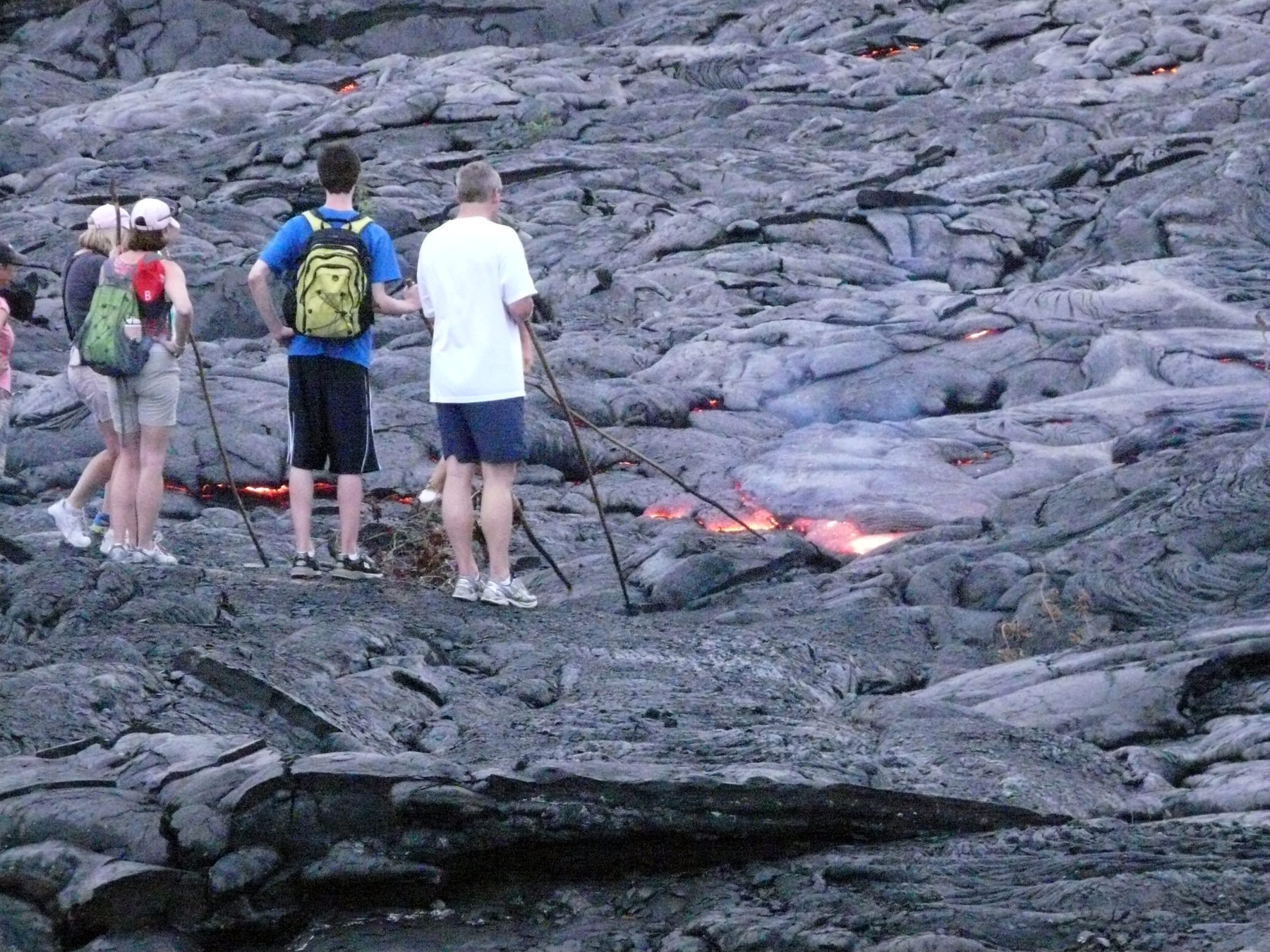 Randonnée pédestre sur les laves volcaniques fraîches de Big Island, Hawaii